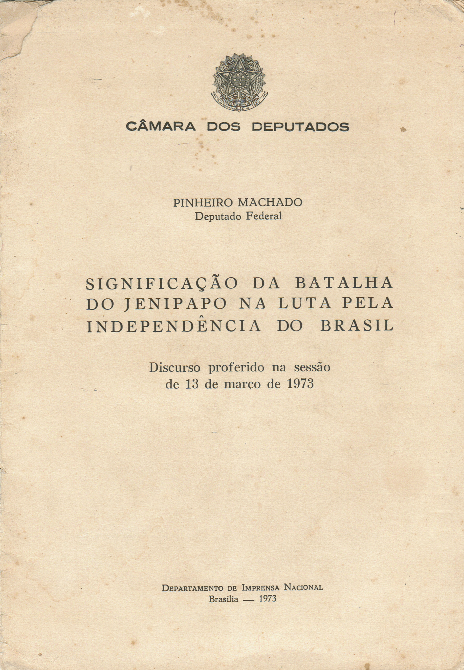 Discurso do deputado federal Pinheiro Machado sobre a Significação da Batalha do jenipapo na luta pela Independência do Brasil, proferido no plenário da Câmara dos Deputados do Brasil, em Brasília, no dia 13 de março de 1973.